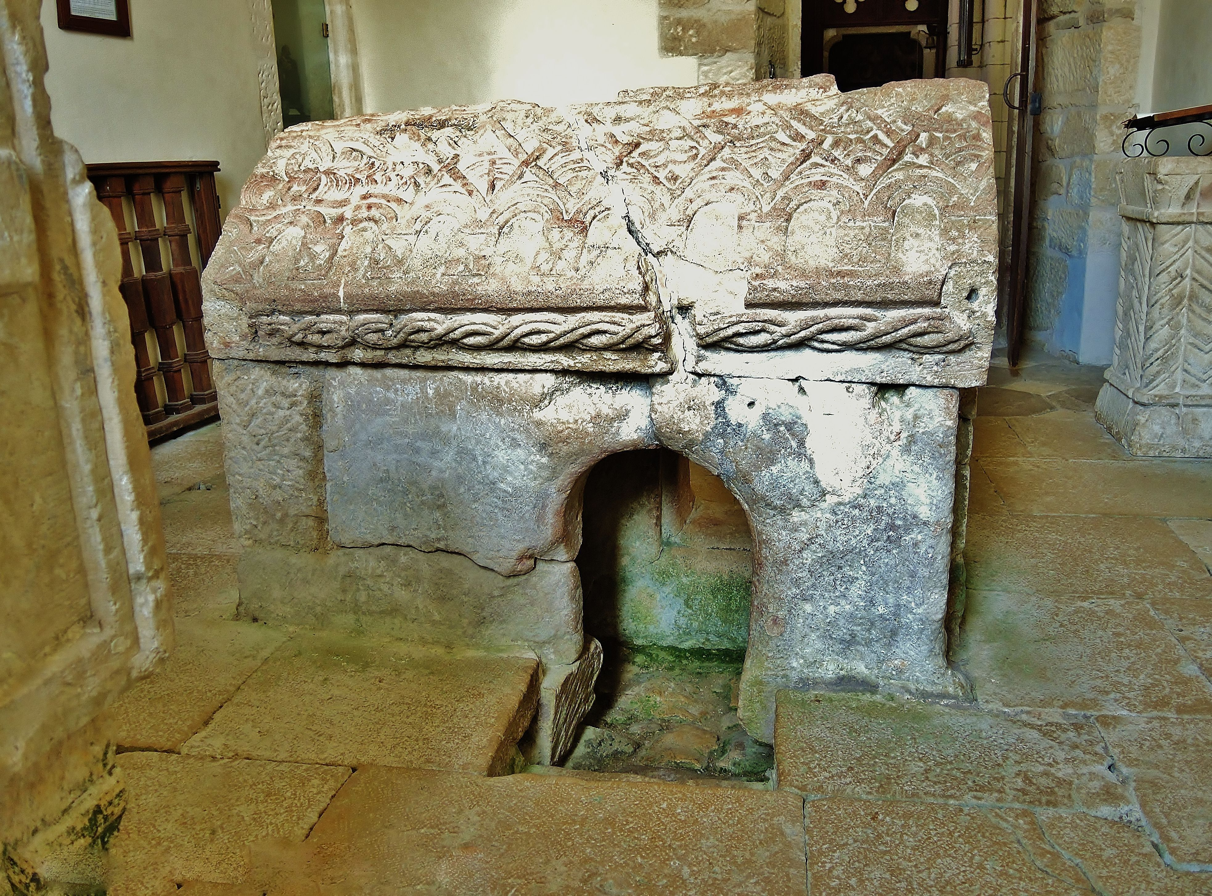 La pierre des fous. Tombeau de Saint-Dizier. Eglise de Saint-Dizier-l'Evêque. Territoire de Belfort